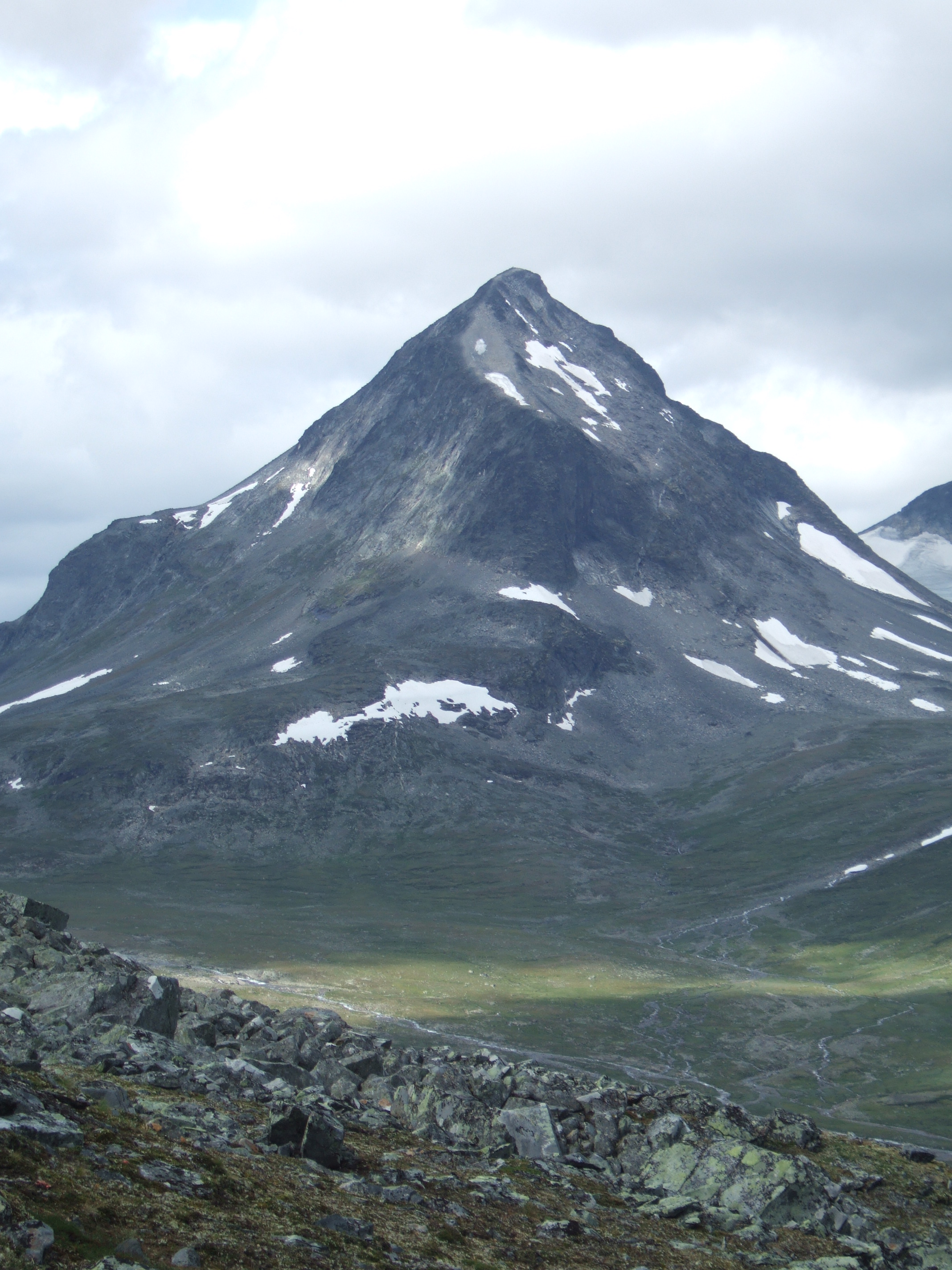 Tverrbytthornet i Lom kommune i Oppland. Det har en høyde på 2102 meter over havet og er det 120. høyeste fjellet i landet av fjellene med primærfaktor på minst 50 meter.